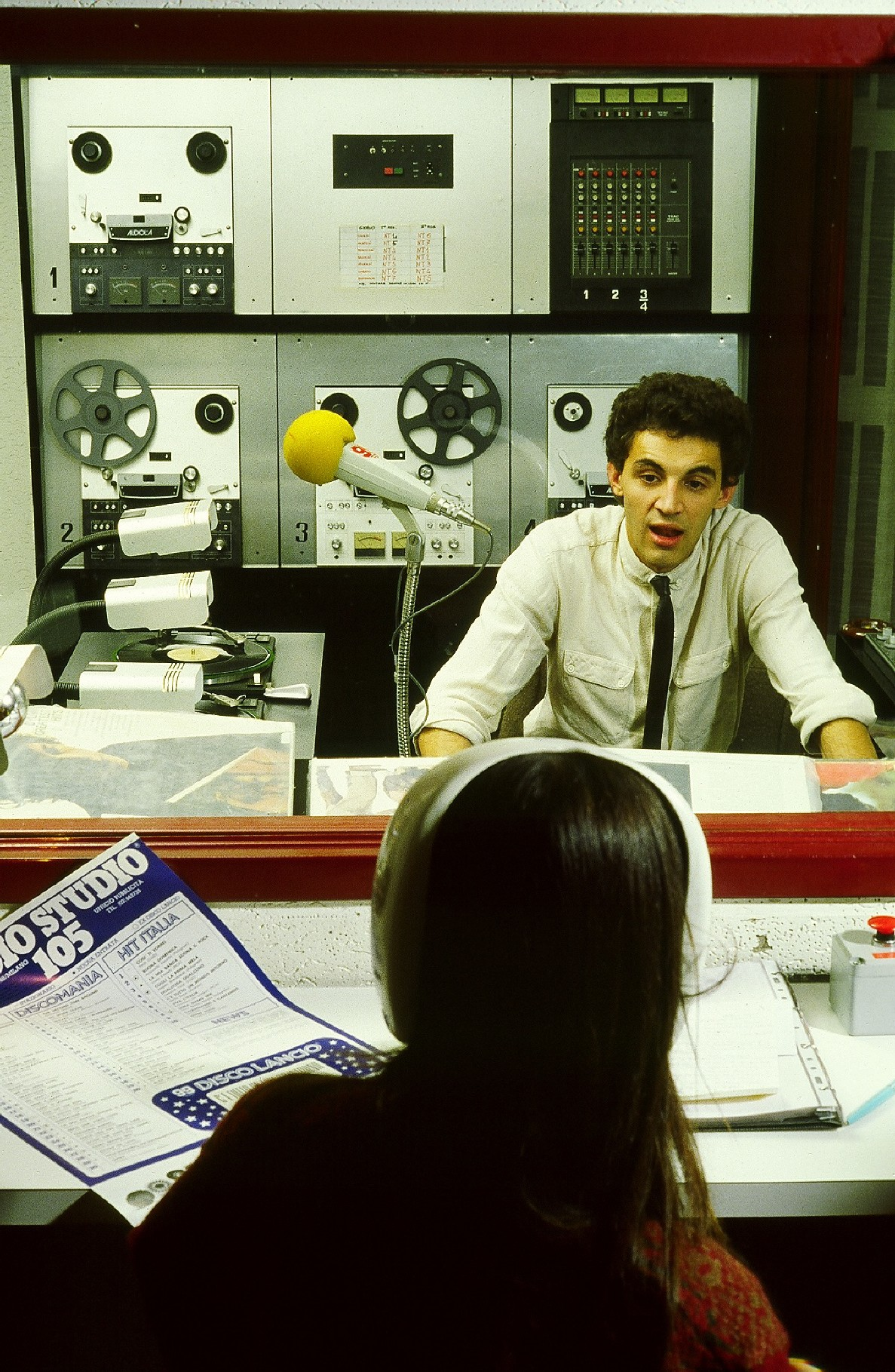 Valerio Gallorini e Loreadana Rancati in diretta a Radio Studio 105 nella sede di Viale Bianca Maria 21 a Milano nel 1979.